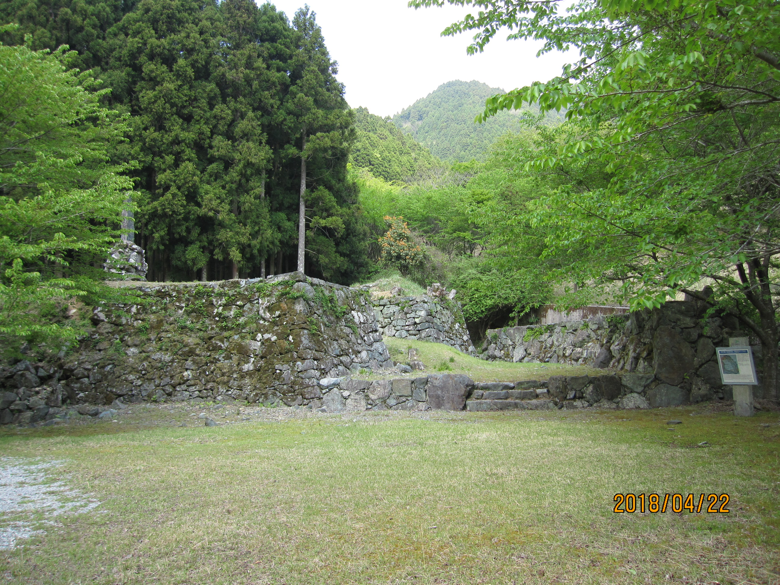 犬鳴御別館の外観